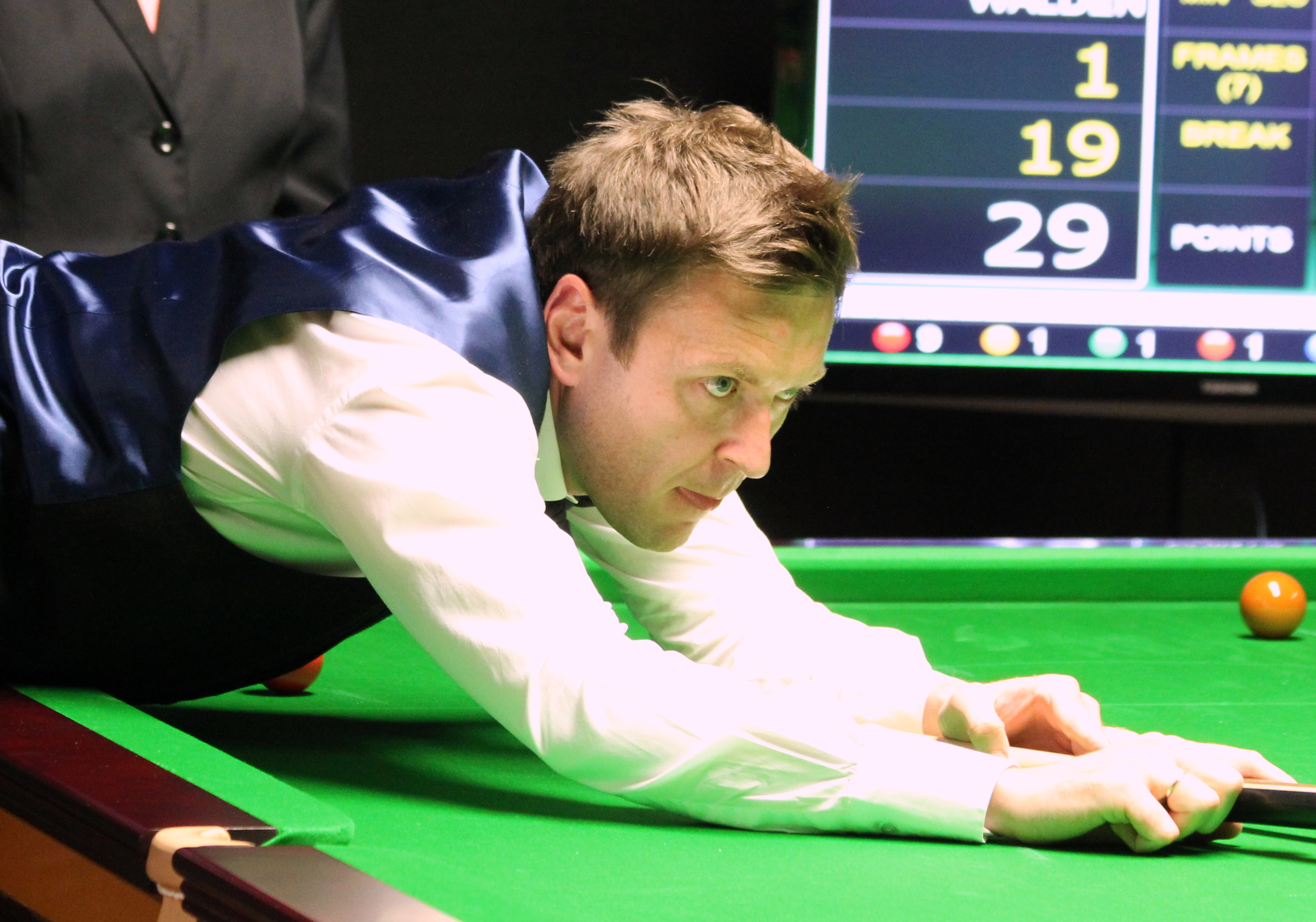 Ricky Walden beim Paul Hunter Classic 2016